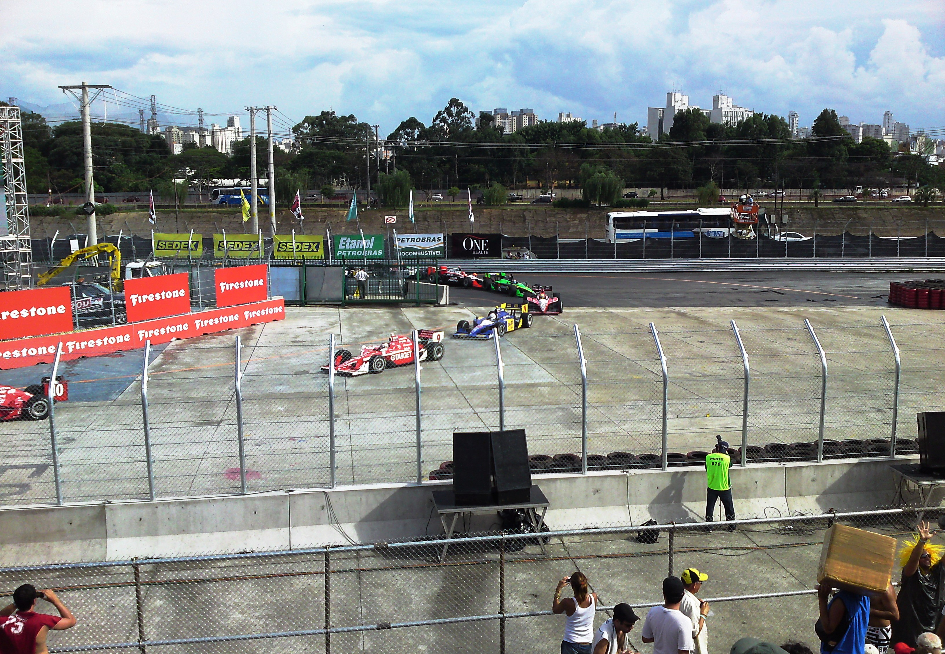 2010 Fórmula Indy